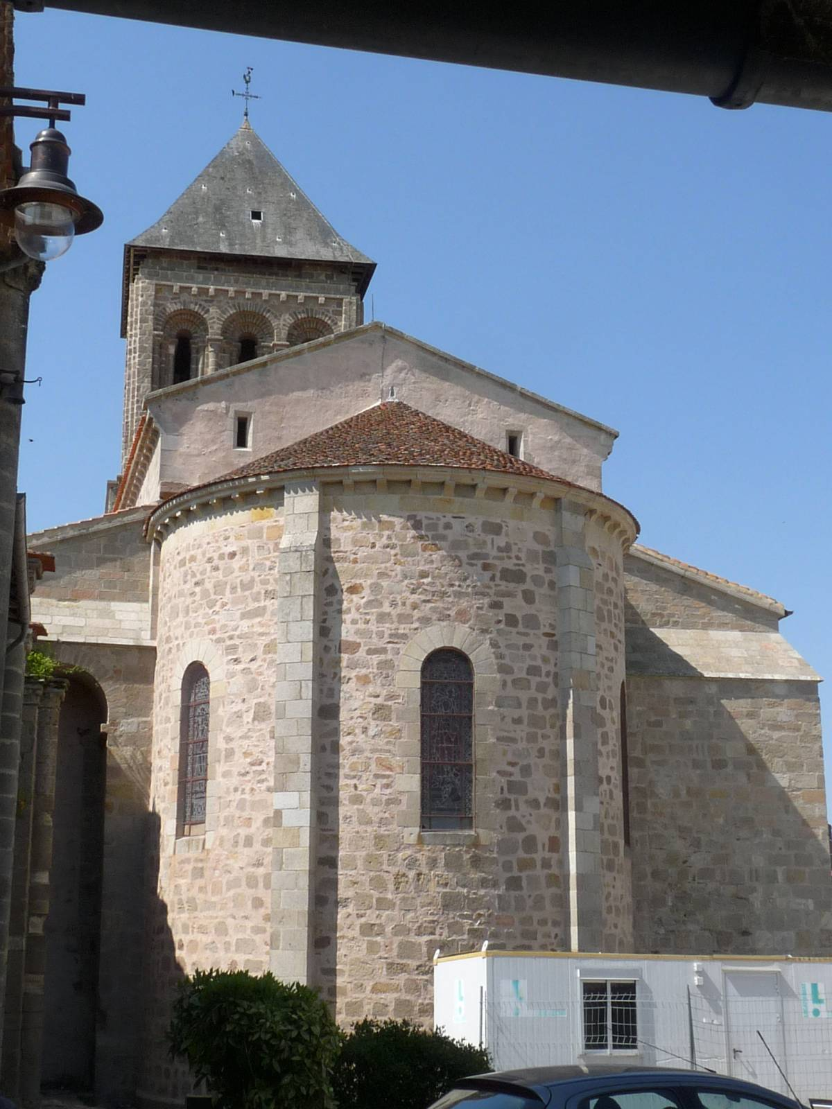 église de Lesterps, Charente, France